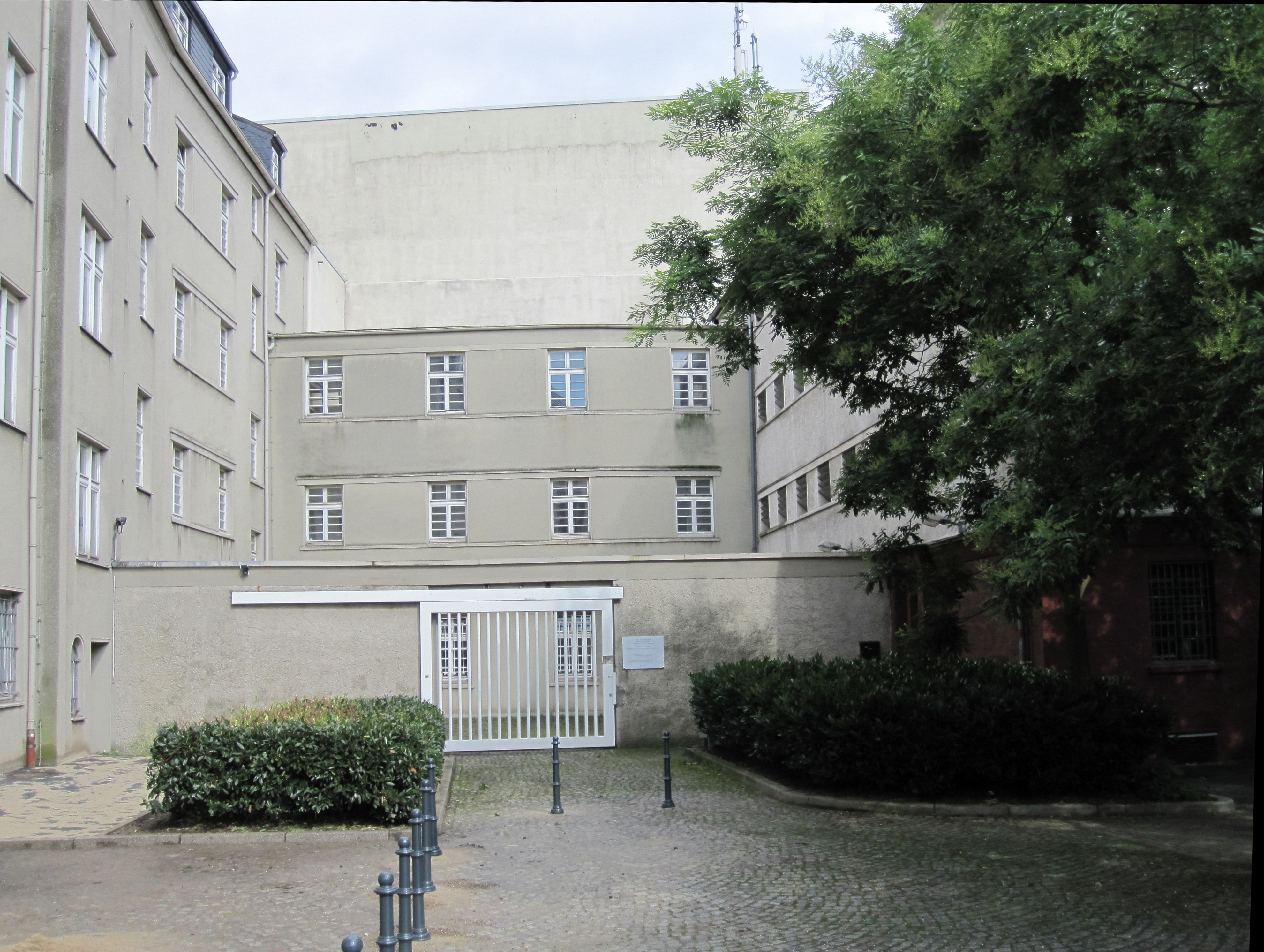 Die ehemalige Steinwache in Dortmund